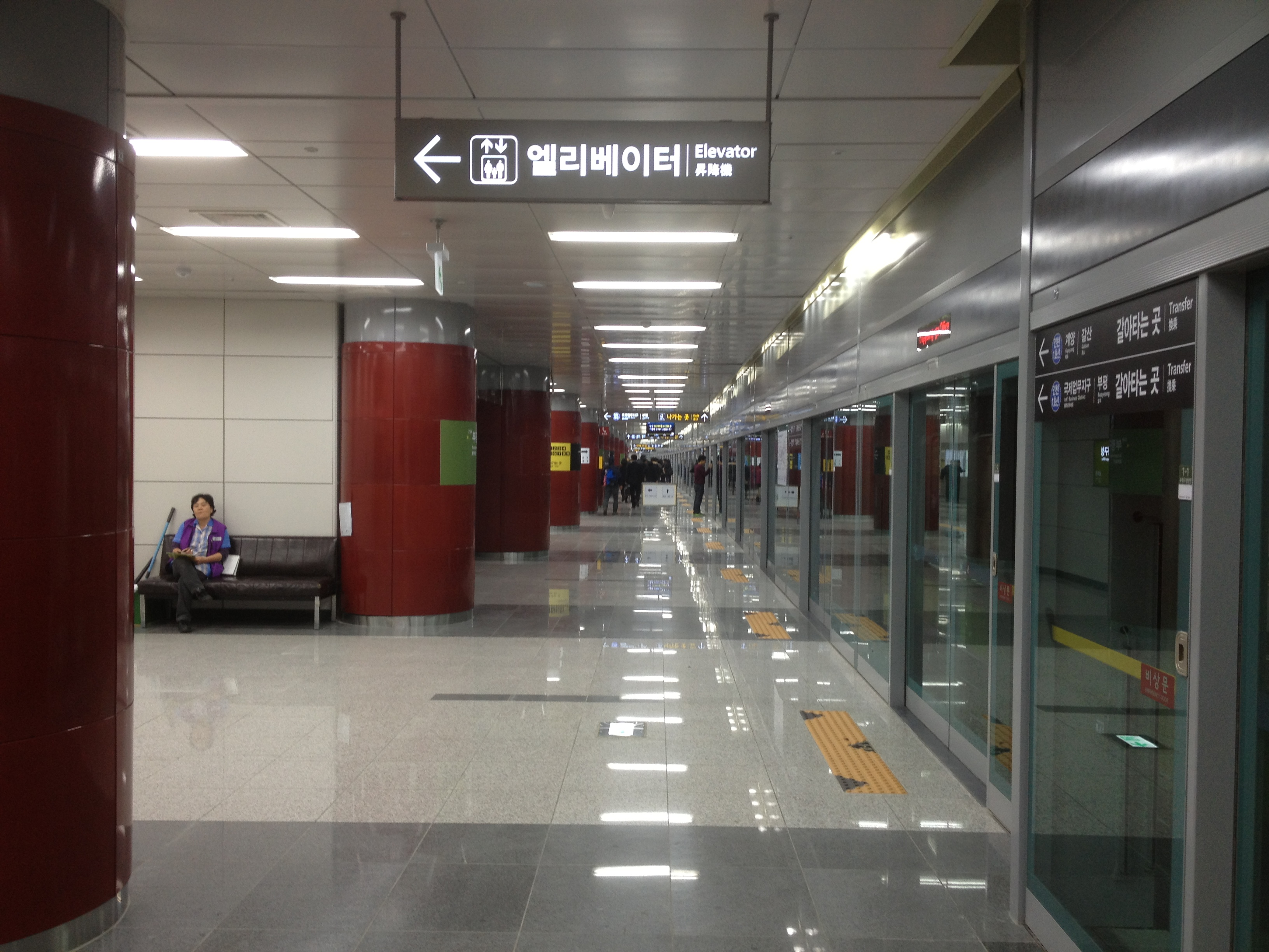 부평구청역 승강장